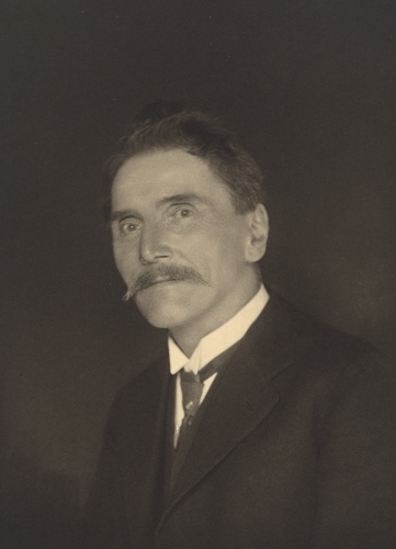 Peter Unterkircher (1858 - 1928), Rakouský politik.